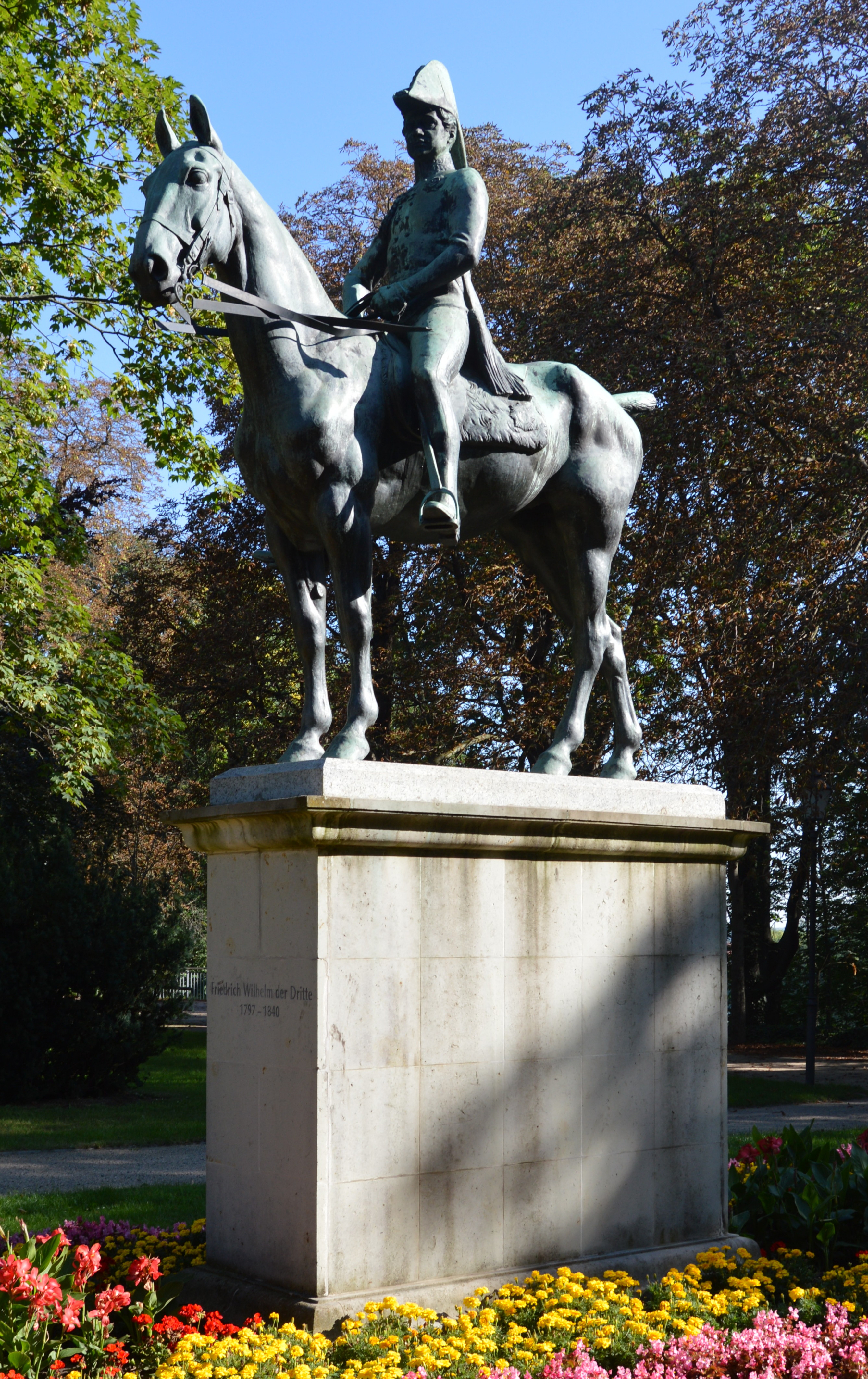 Reiterdenkmal Friedrich Wilhelm III. in Merseburg